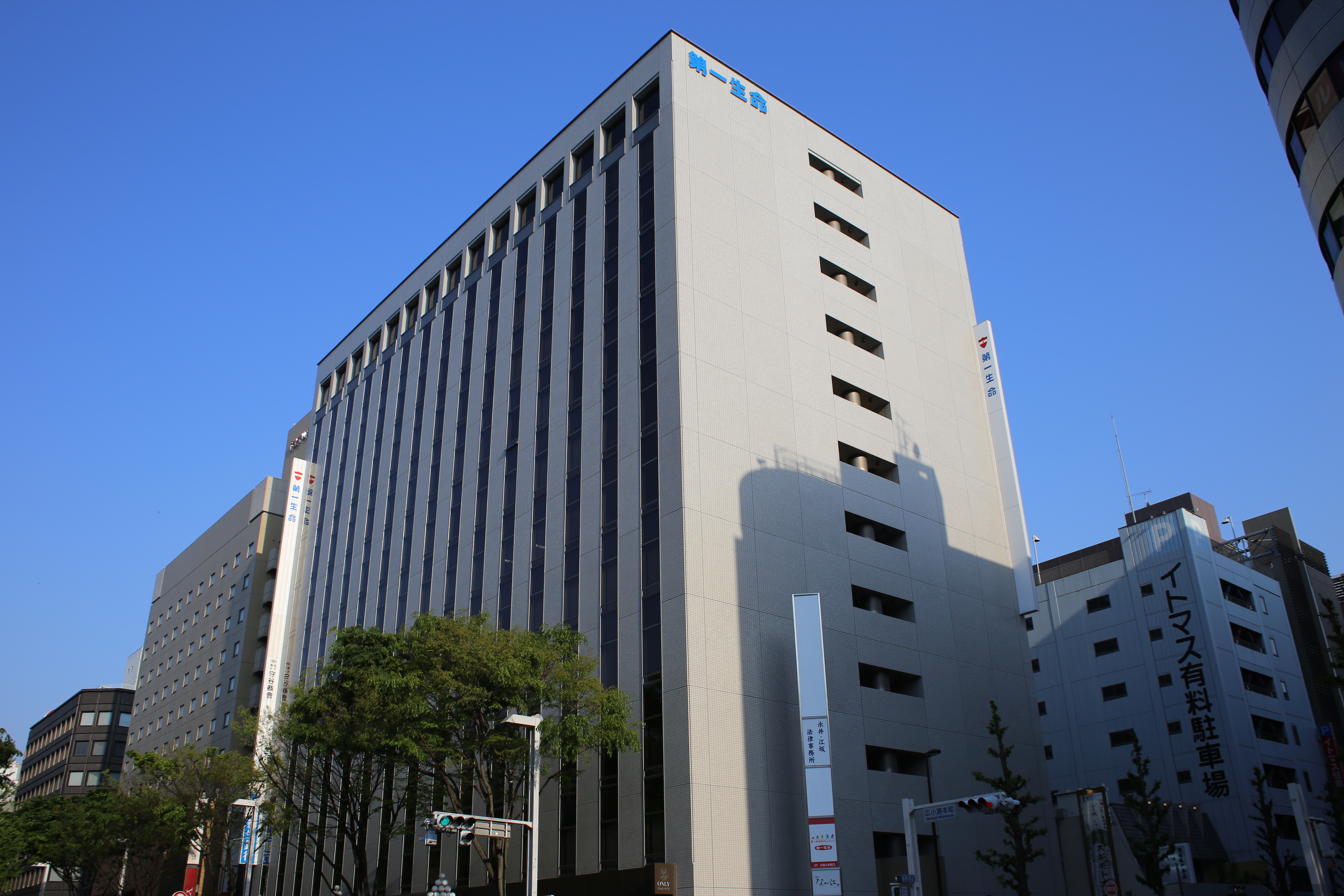 名古屋市中区栄三丁目の広小路第一生命ビルを北側公道西側より撮影